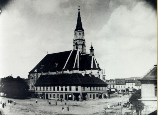 Kolozsvár Fő tere 1890-ben